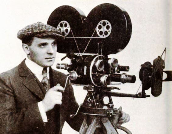 Jackson Rose, directeur de la photographie américain (18861956). Photographié en 1918 aux commandes d'une caméra Bell & Howell 2709.